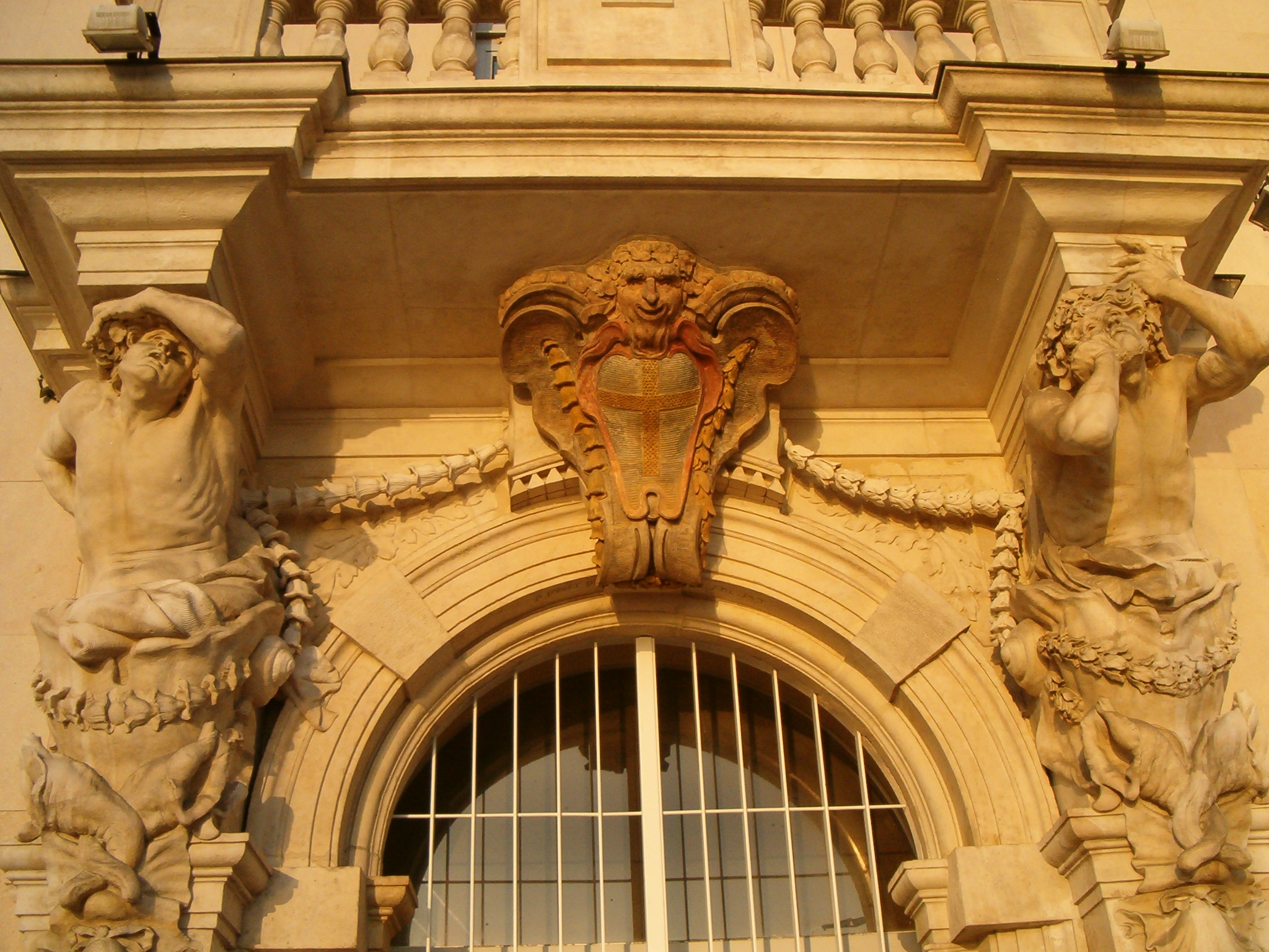 Atlantes de Pierre Puget, Toulon, France